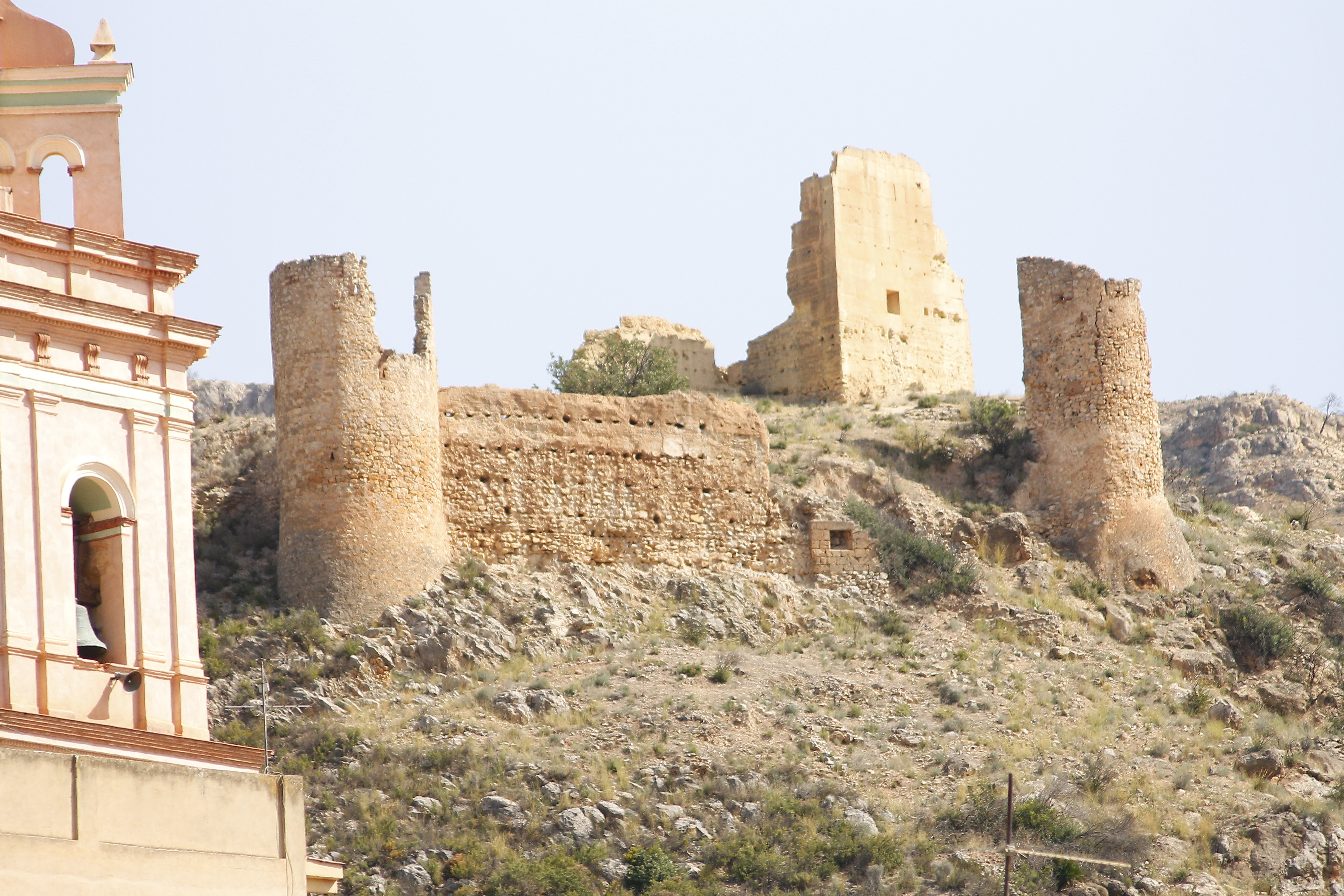 Gestalgar